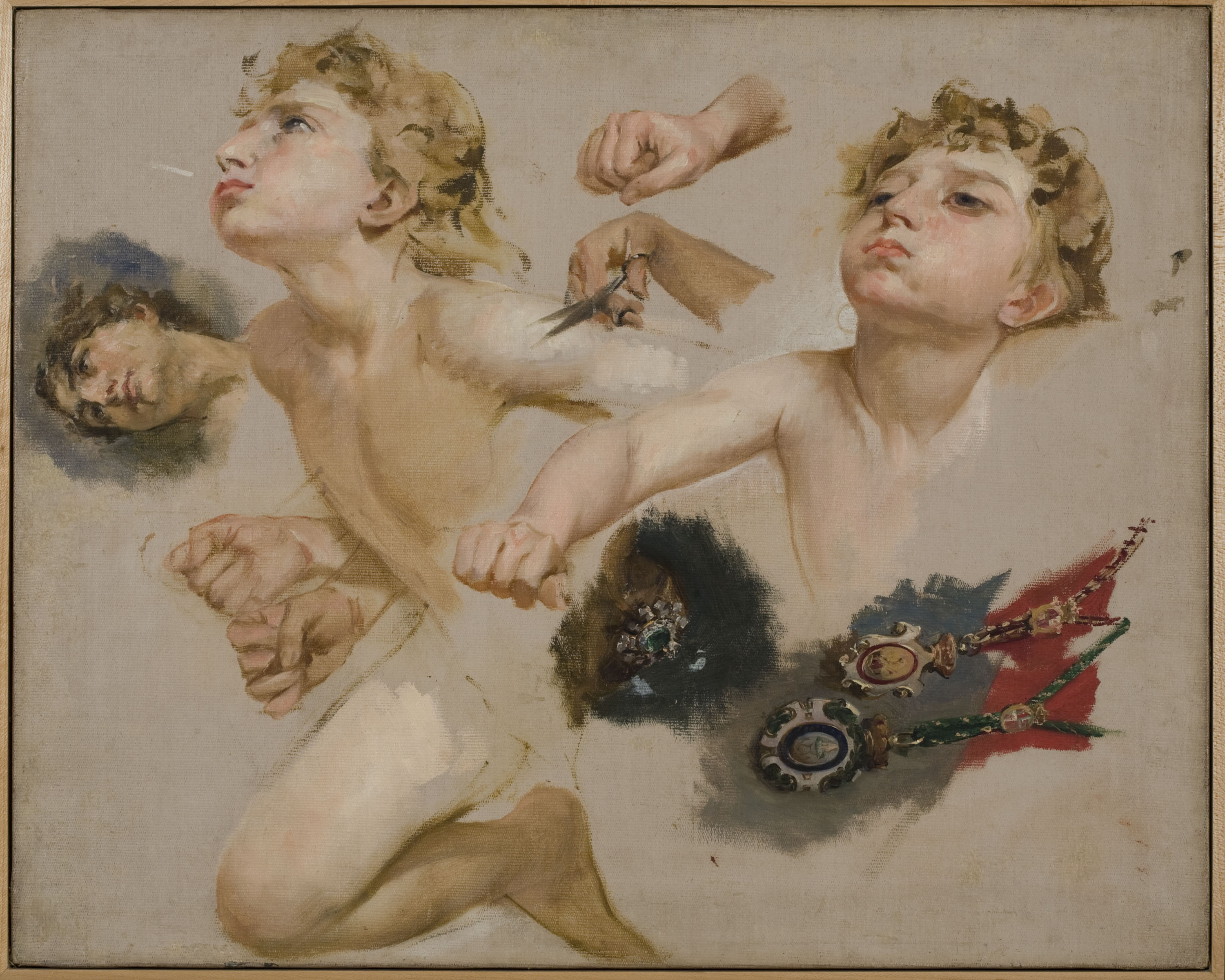 Estudio preparatorio de la figura de Céfiro para el cuadro El triunfo del Día sobre la Noche precedido de la Aurora, de Antoni Caba, 1882, Museo Nacional de Arte de Cataluña, Barcelona.